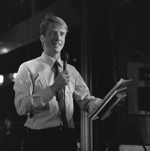 Jan Lenferink.